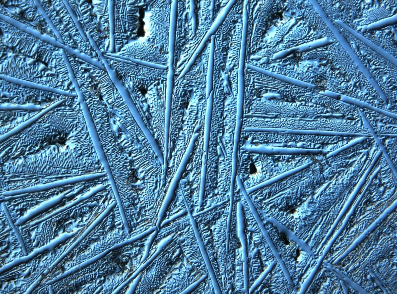 Hartguss, Interferenzphasenkontrast, Primärzementit und Ledeburit